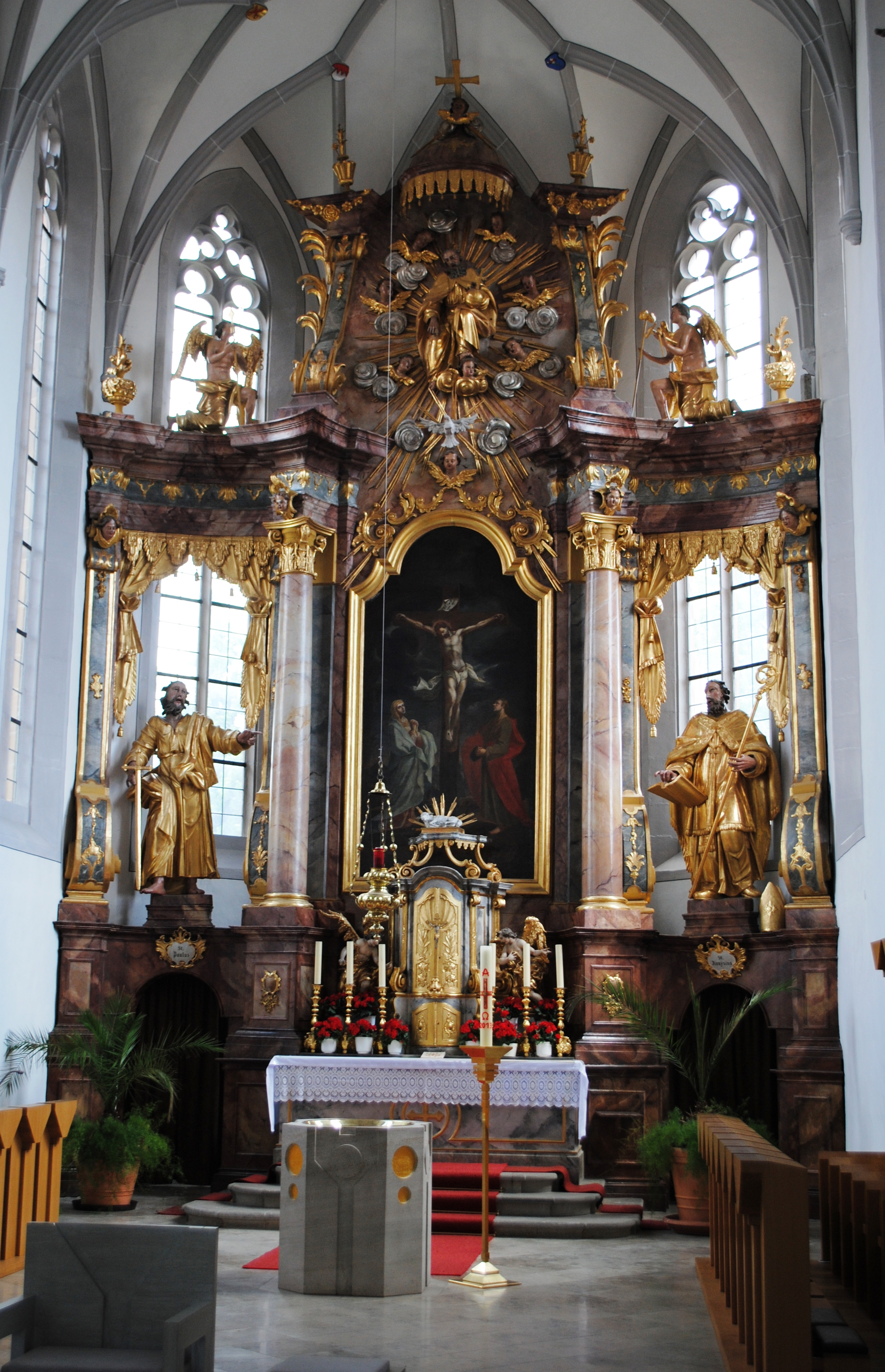 Hochaltar, Hl. Kreuzkirche, Stadtschwarzach